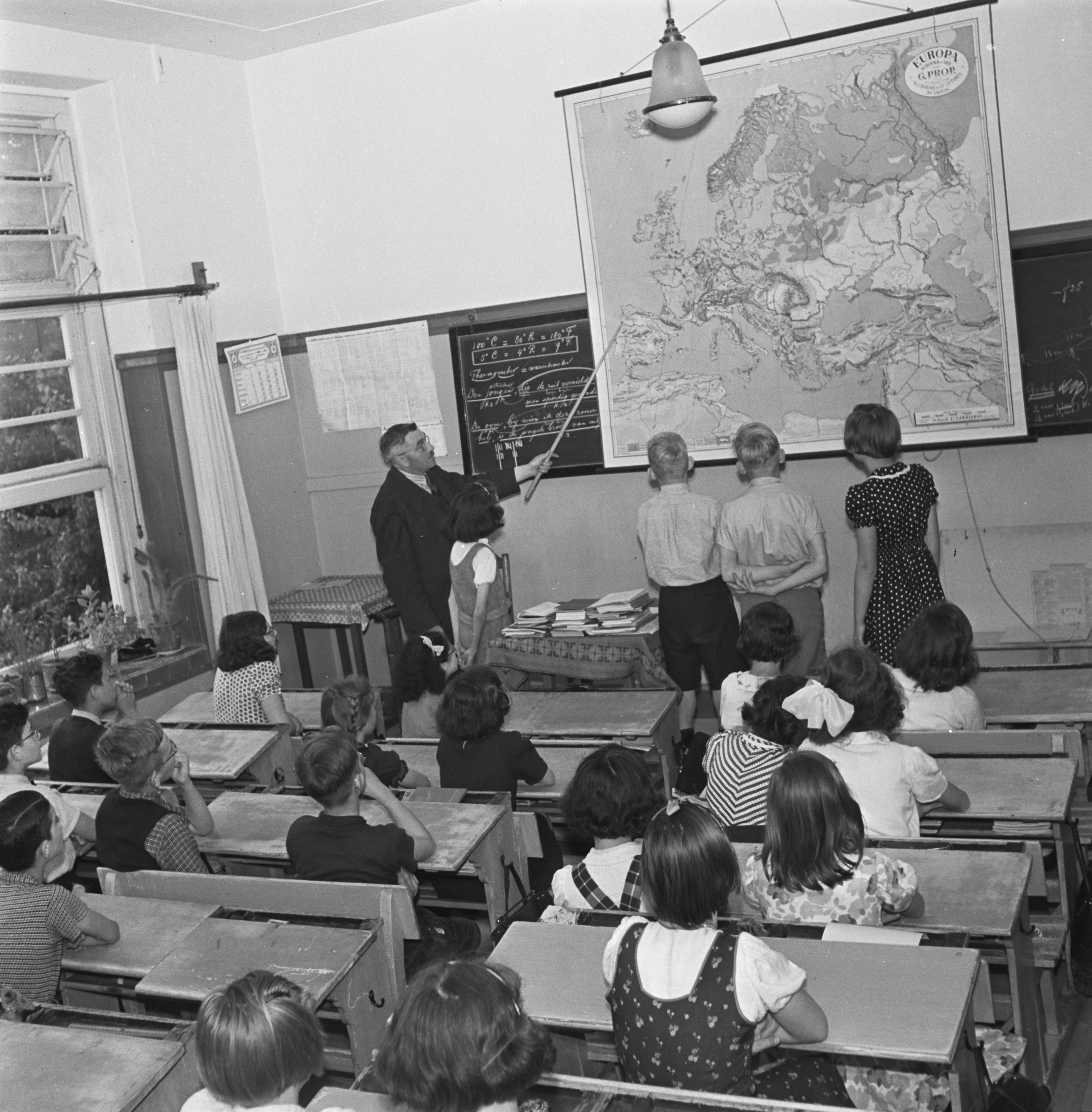 Collectie / Archief : Fotocollectie Anefo Reportage / Serie : [ onbekend ] Beschrijving : Kinderen in een klas Datum : 23 januari 1946 Trefwoorden : kinderen, onderwijs, scholen Fotograaf : Oorthuys, Cas / Anefo Auteursrechthebbende : Nationaal Archief Materiaalsoort : Negatief (zwart/wit) Nummer archiefinventaris : bekijk toegang 2.24.01.03 Bestanddeelnummer : 901-4054